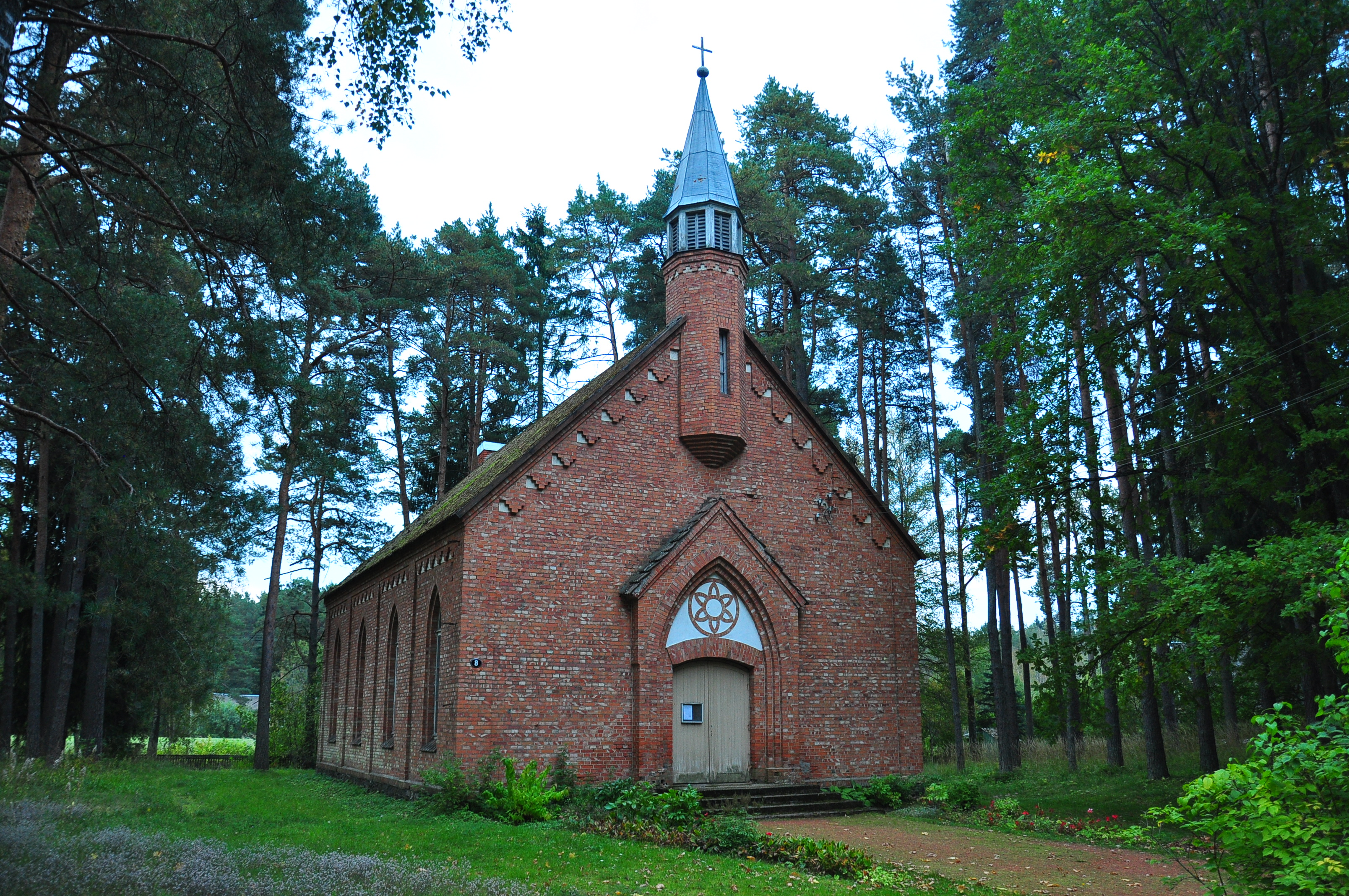 Elva kirik, 1920.a